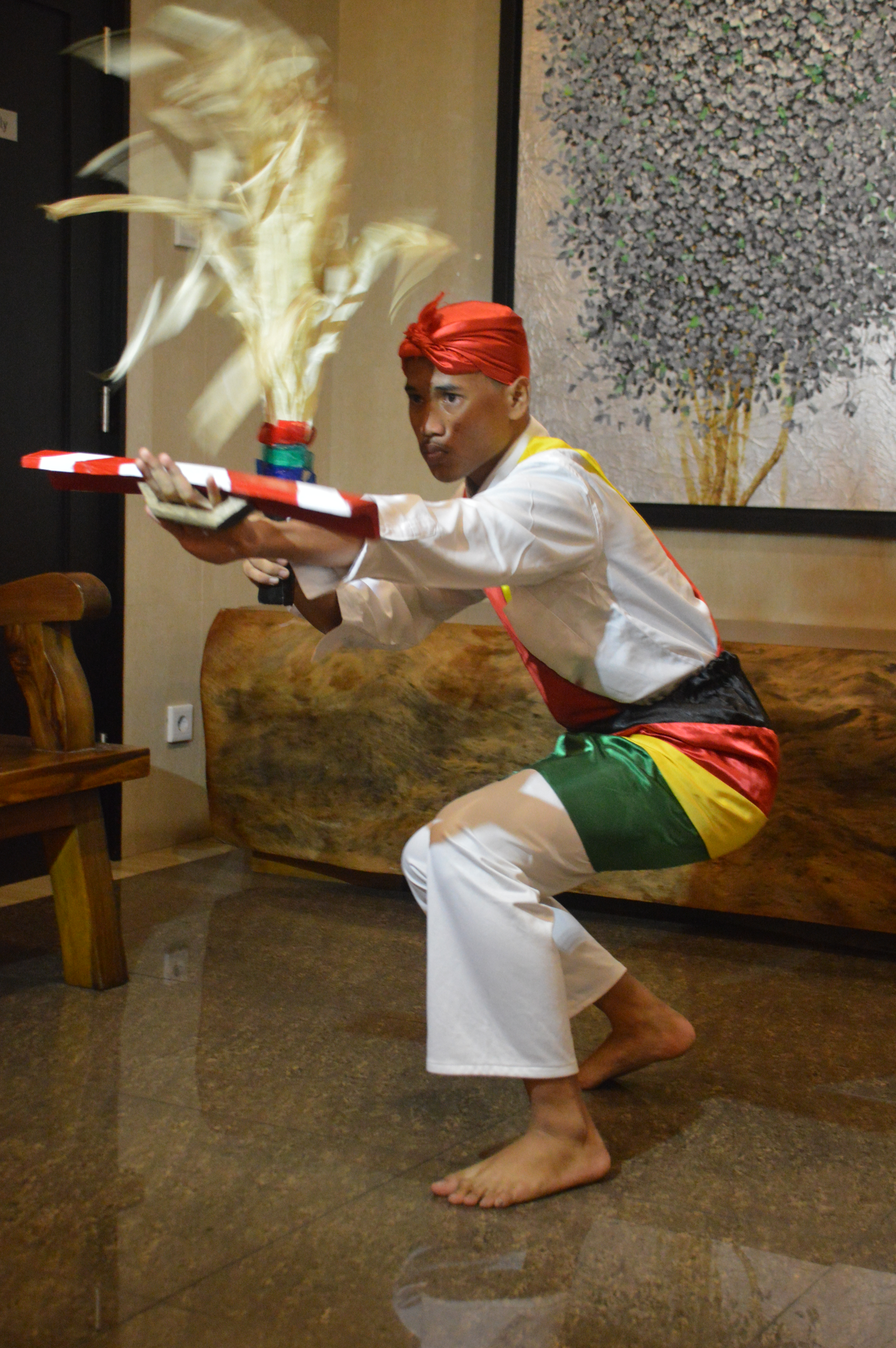 Darryl Sanggelorang Memperagakan Tarian Soya-soya